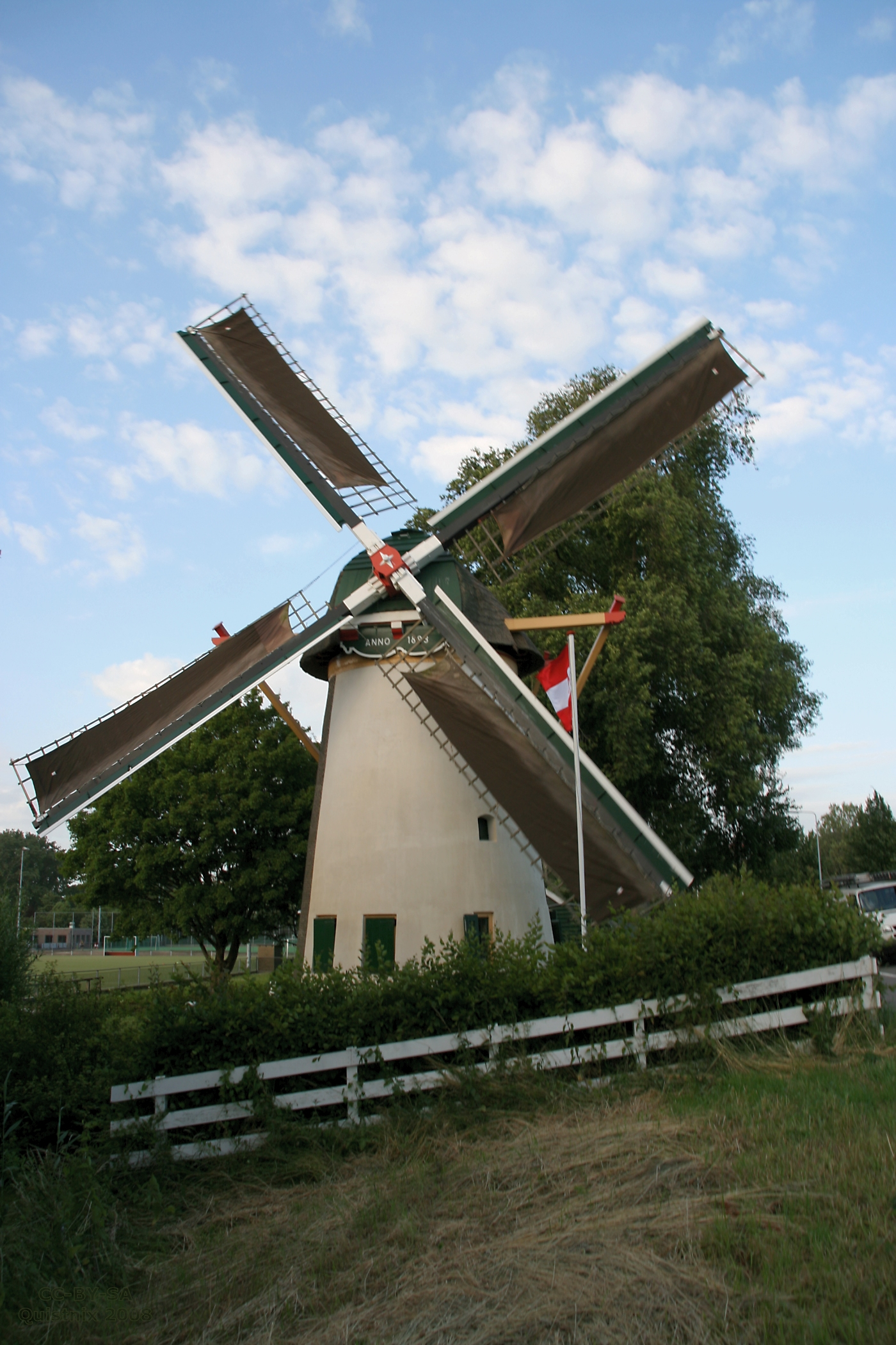 Leiden: Rodenburgermolen draaiend met zeilen